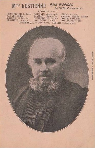 Clémence Lestienne ou femme à barbe